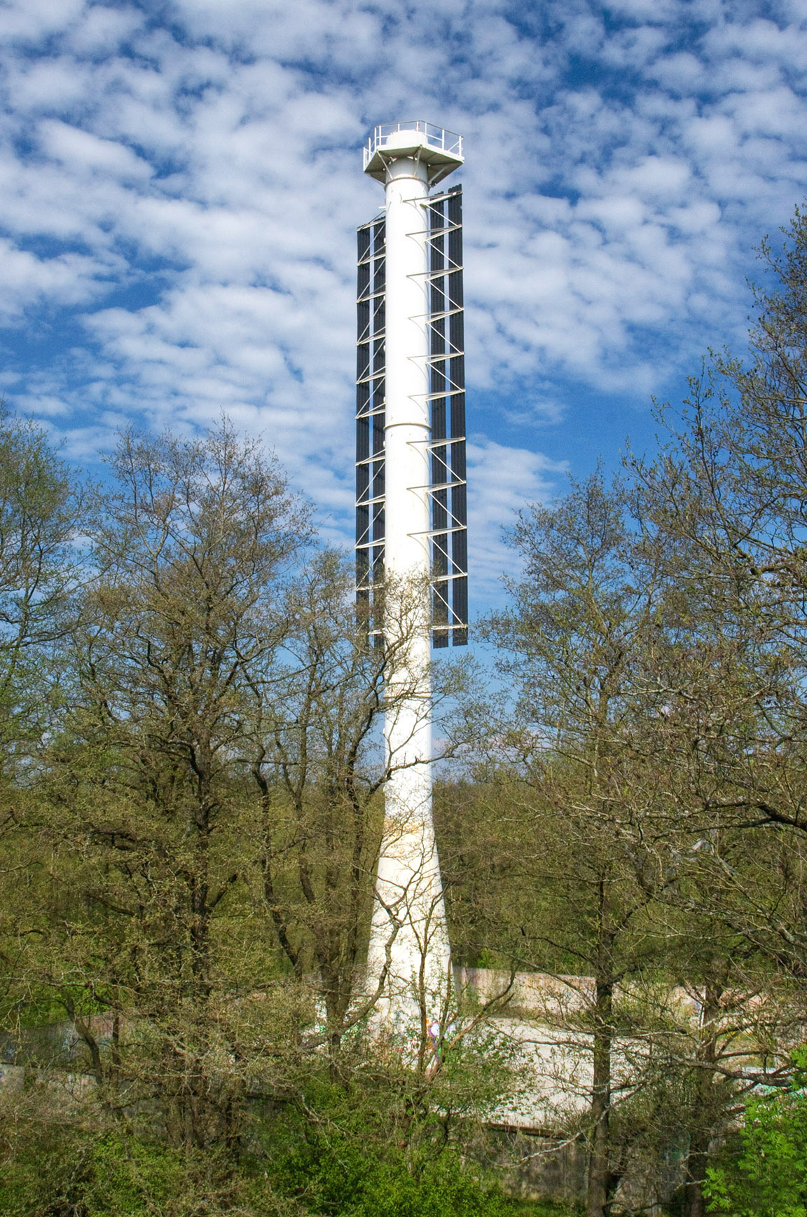 Kallavere ülemine tulepaak